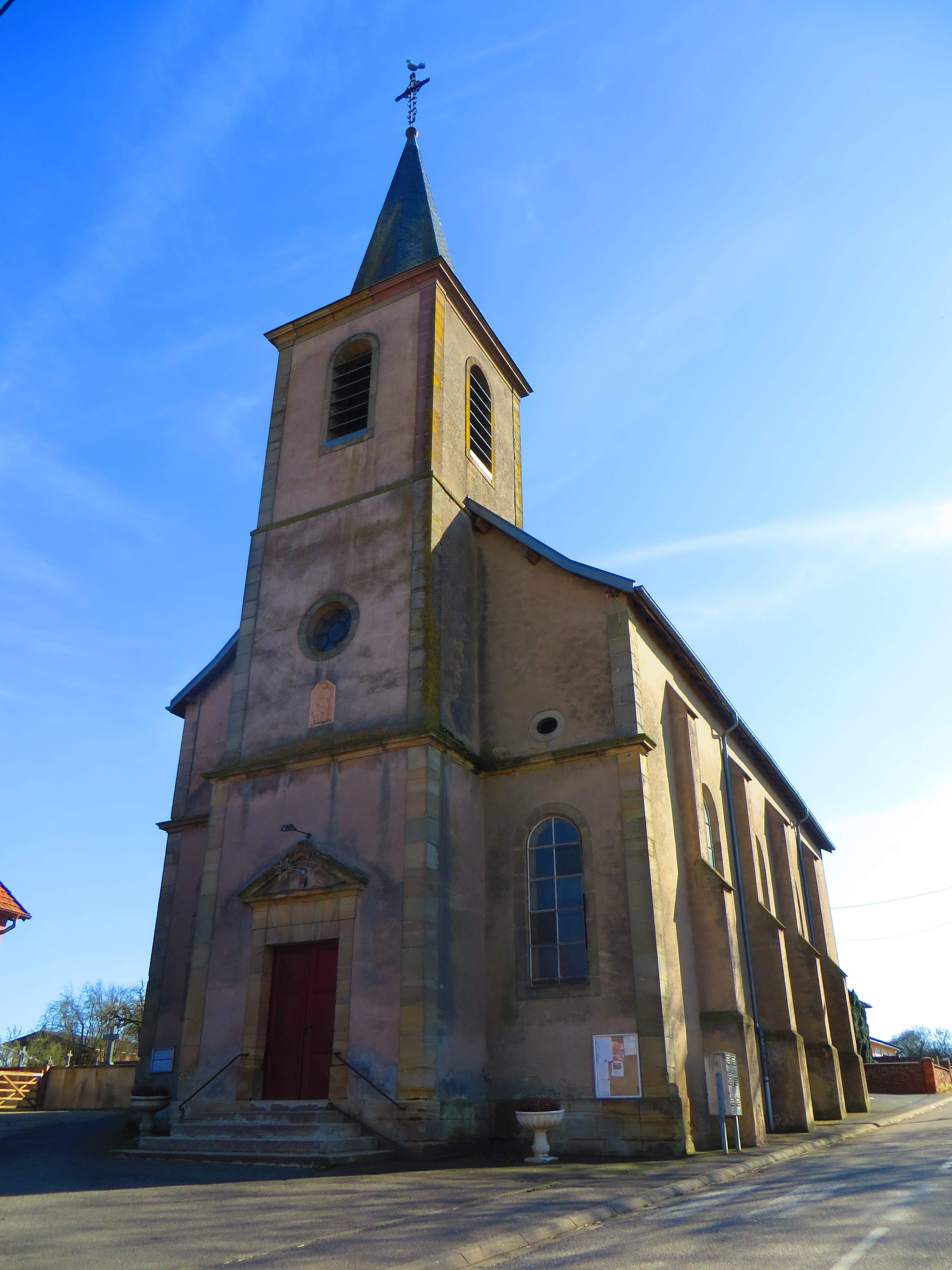 Petit-Tenquin Notre-Dame de la Visitation